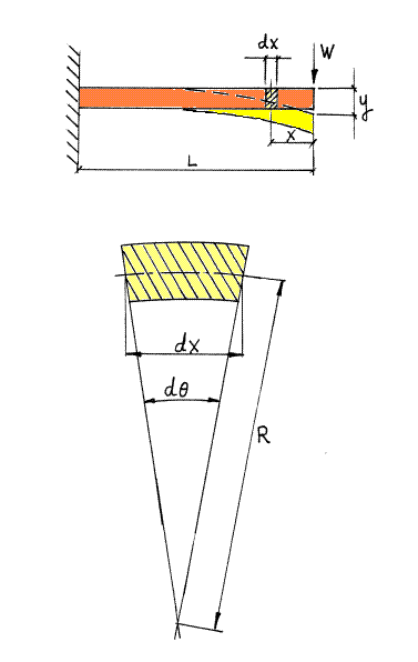 תרשים קורה רתומה בצד אחד ומועמסת בכח בצד החופשי הכין י.ש. 12:55, 2 בינואר 2007 (IST)